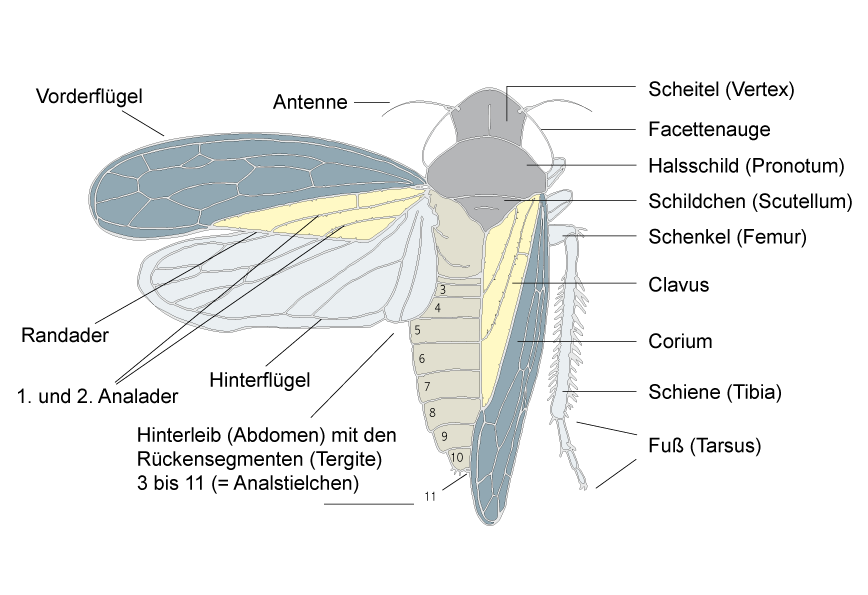 Schemazeichnung: Grundbauplan der Rundkopfzikaden (Cicadomorpha)